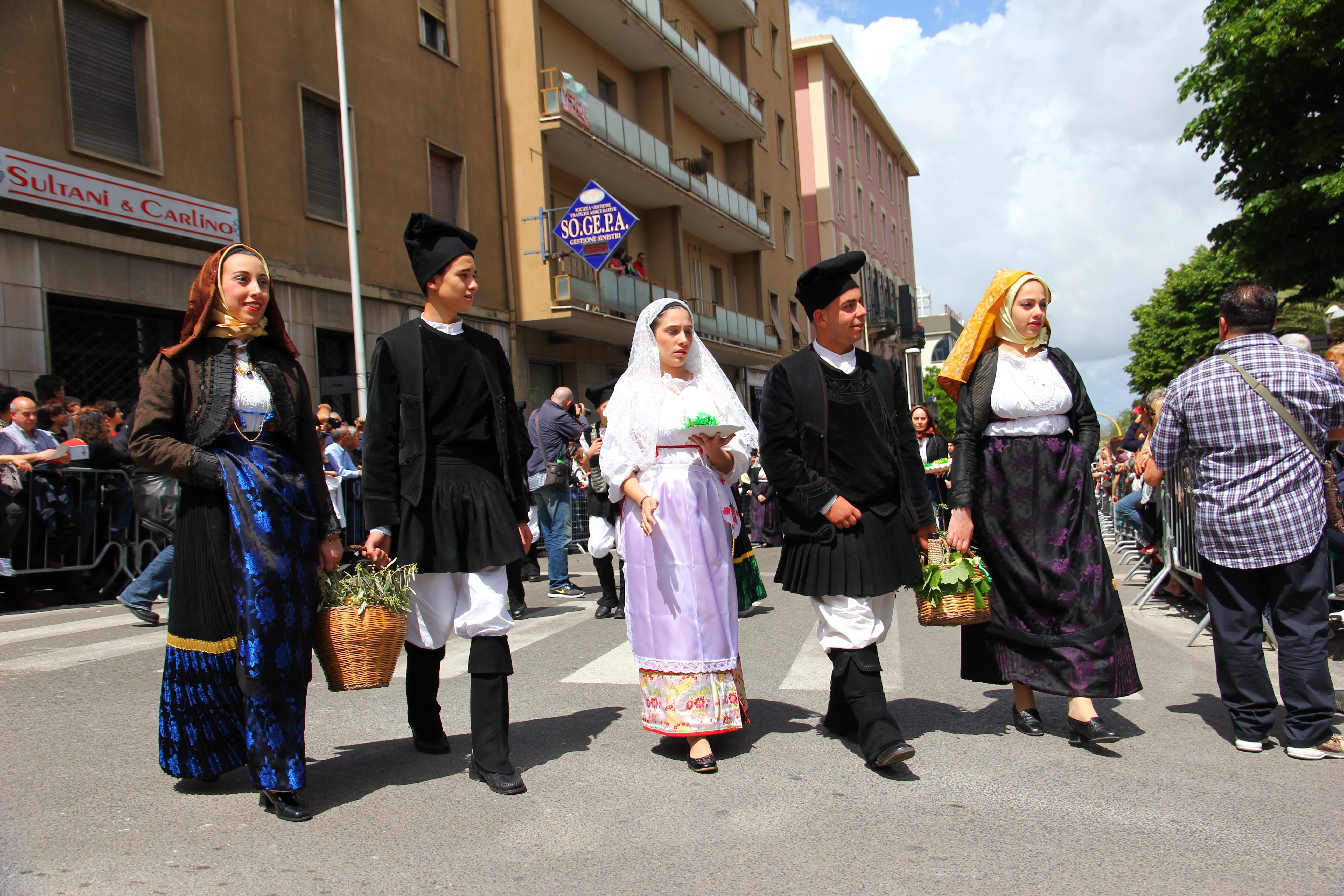 Cavalcata Sarda 2013 (Sassari)